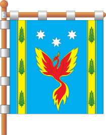 Прапор Шевченківського району (Дніпро)